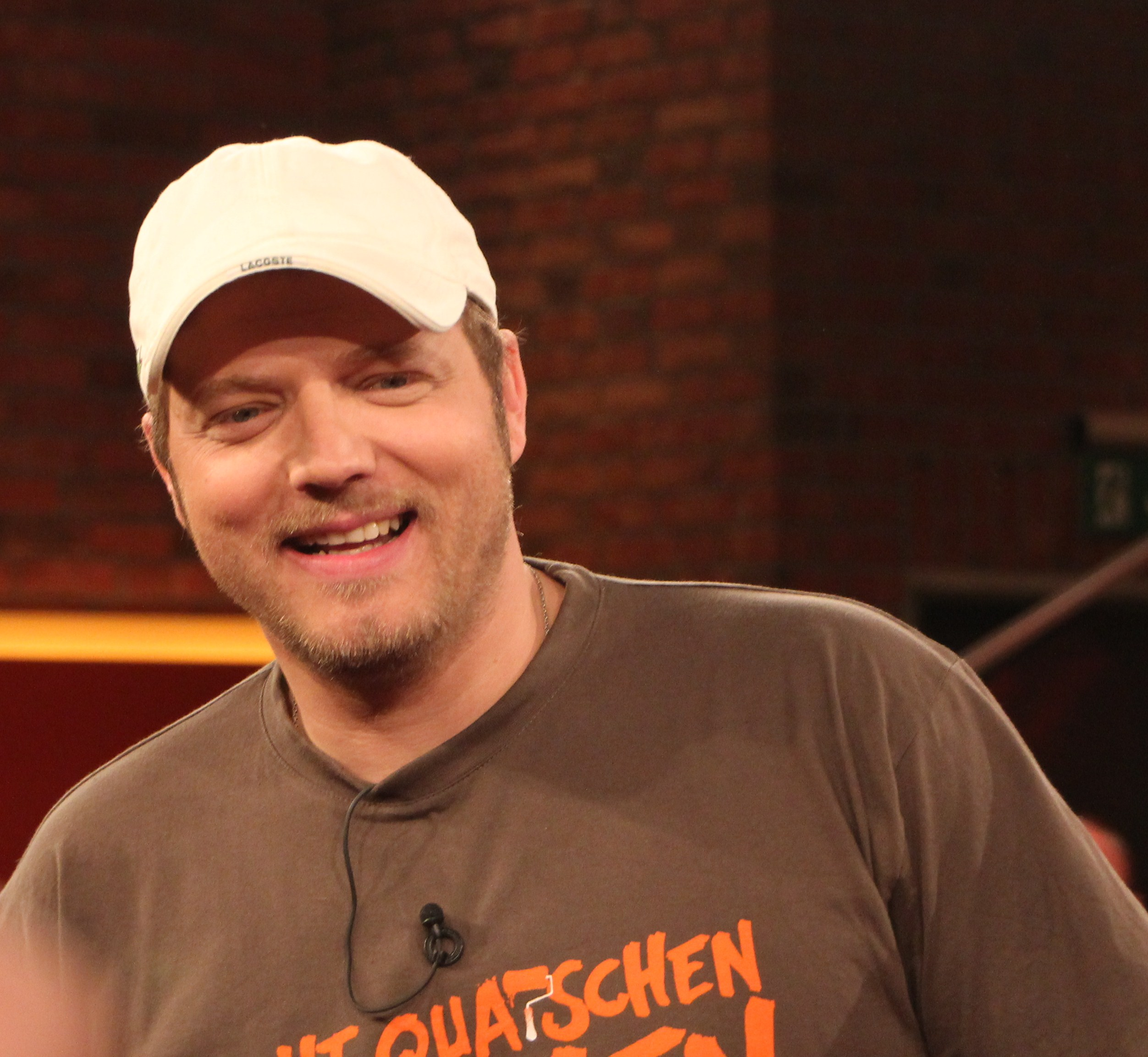 Mario Barth (* 1. November 1972 in Berlin) ist ein deutscher Komiker, der sich in seinen Programmen hauptsächlich mit der zwischenmenschlichen Beziehung von Mann und Frau beschäftigt.